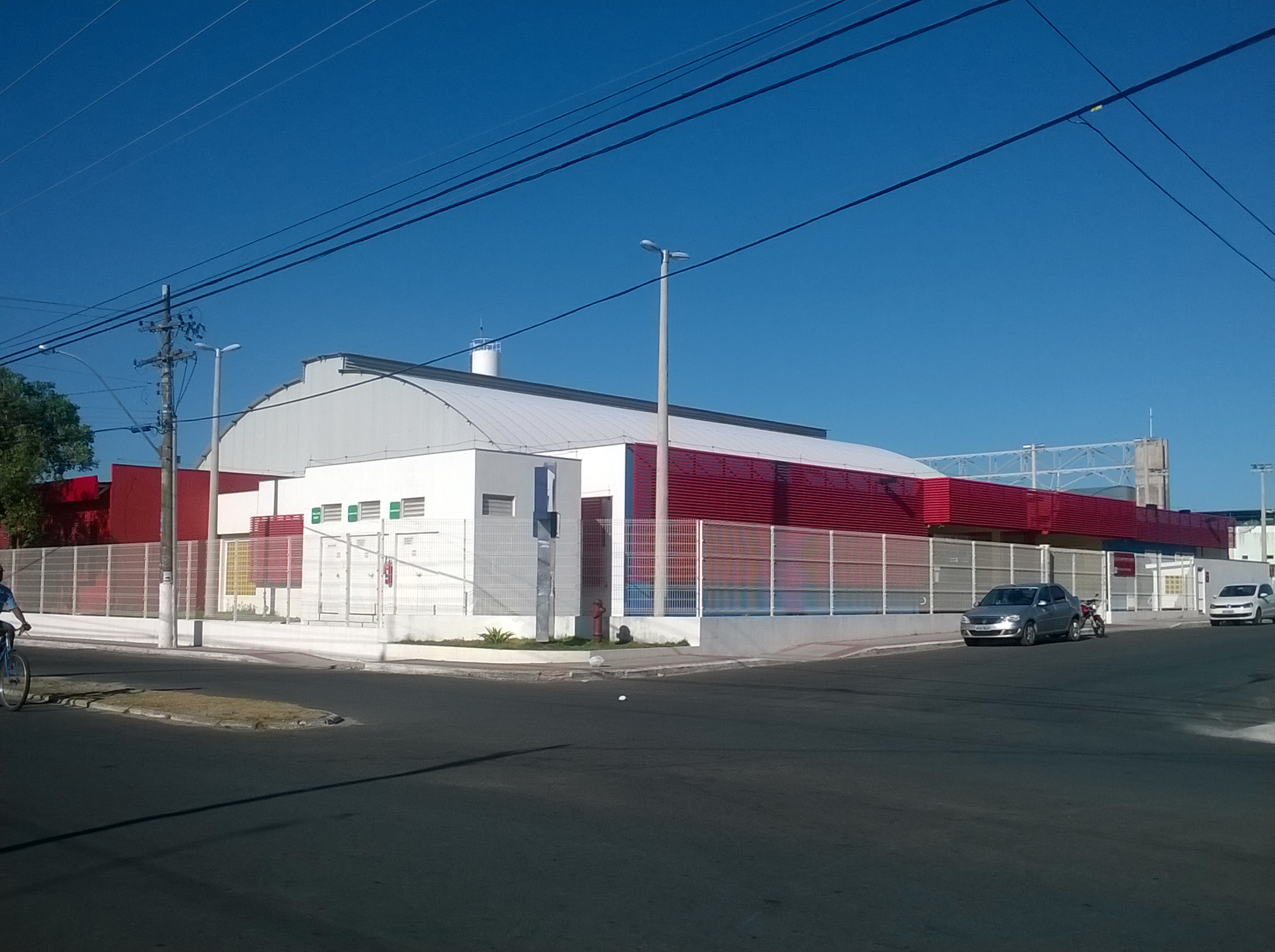 Polivalente São Mateus 2015